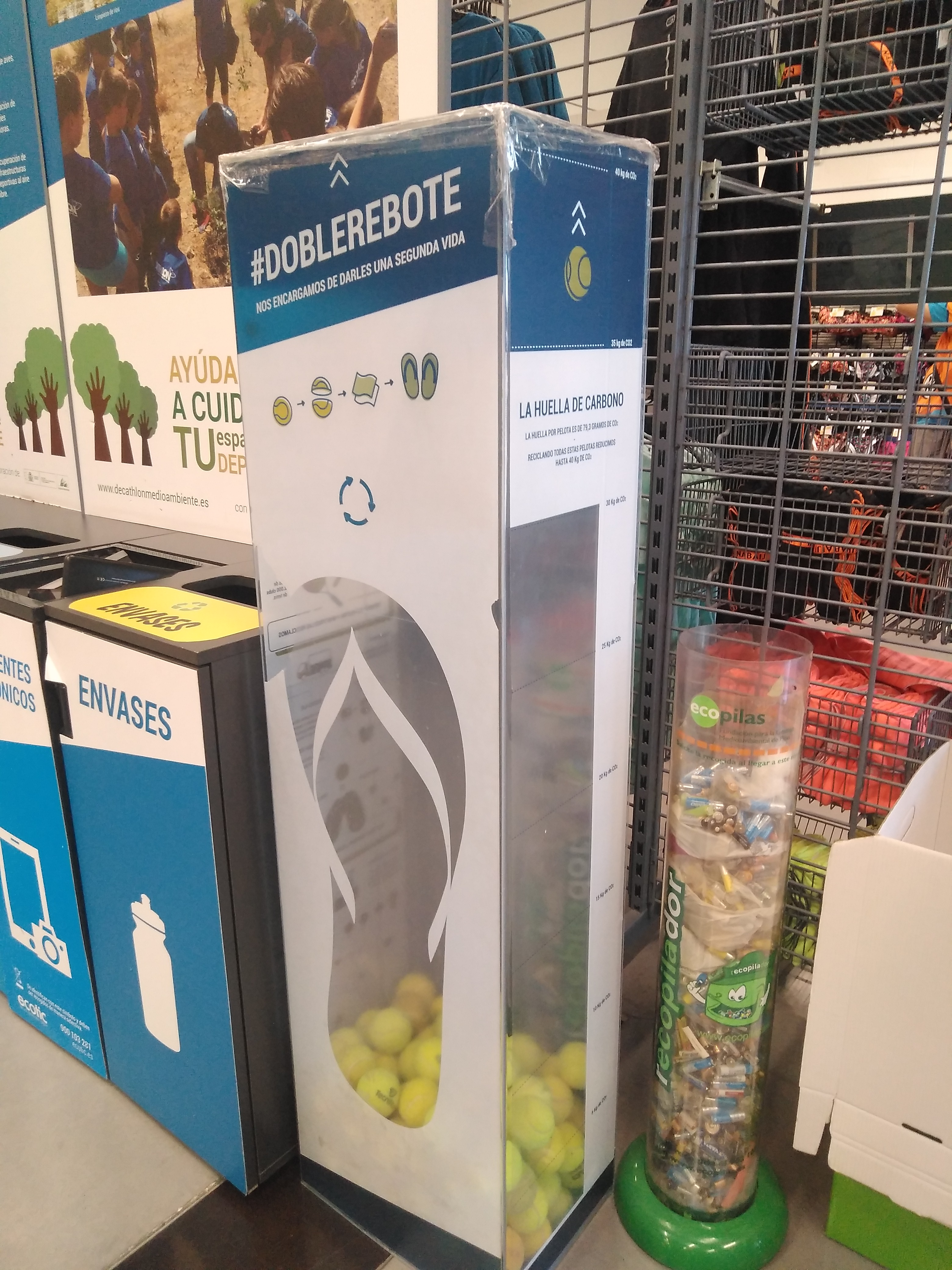 Contenedor para recogida selectiva de pelotas de tenis para su reciclaje (tienda Decathlon, España)